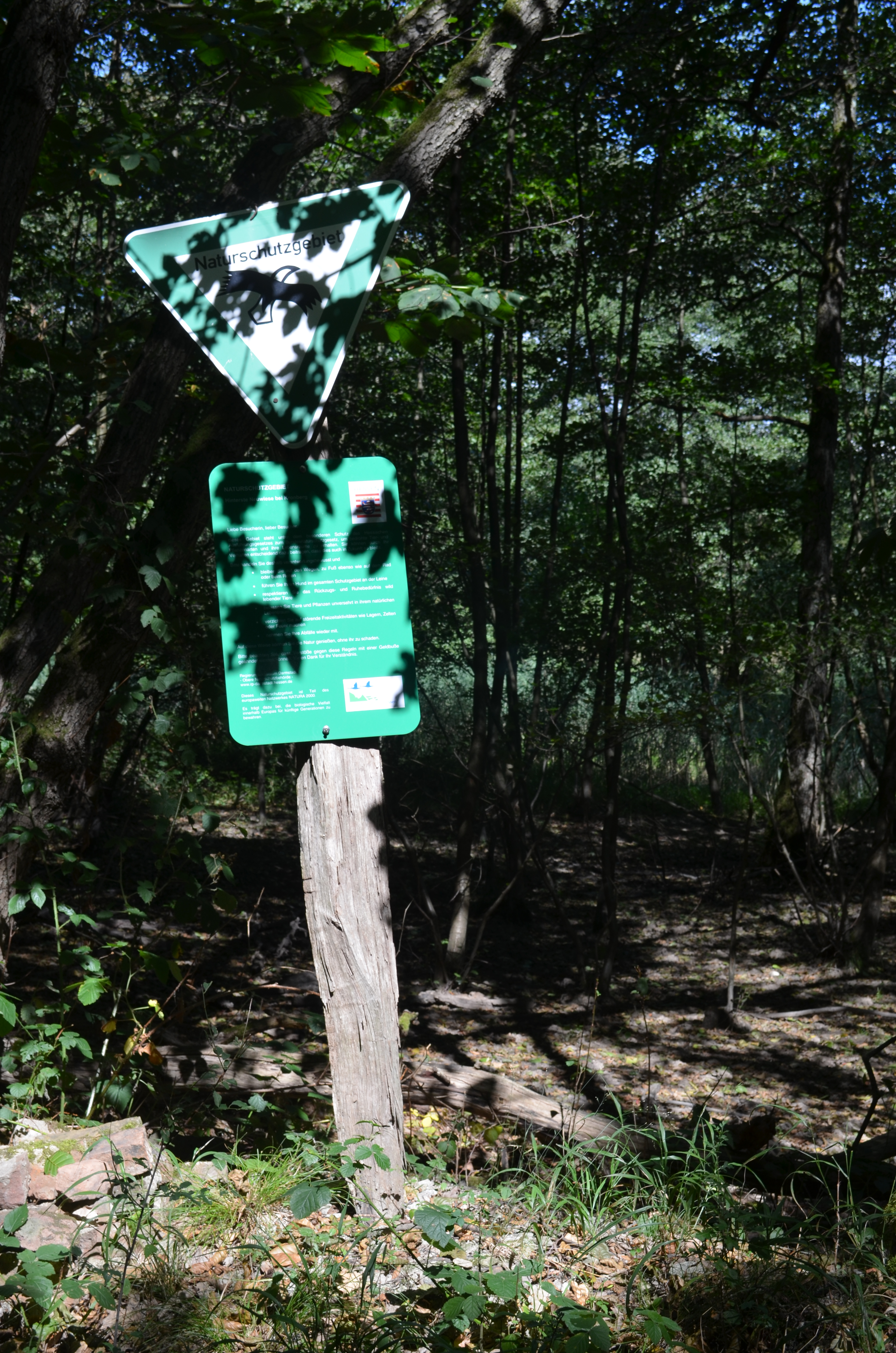 Kronberg, NSG Hinterste Neuwiese bei Kronberg, Schild